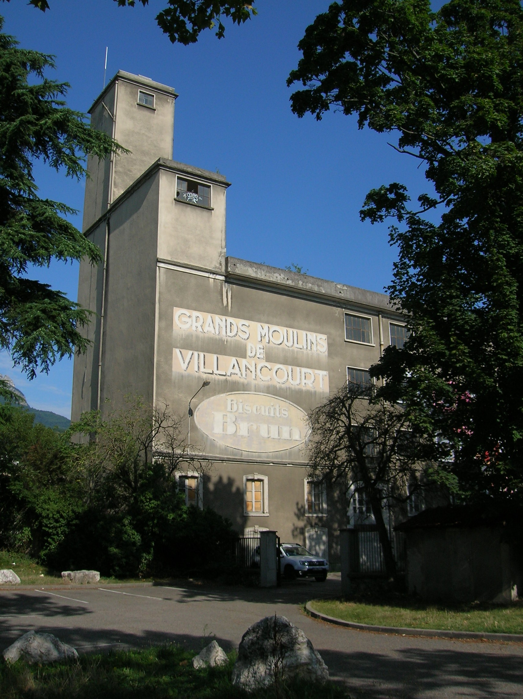 Moulins de Villancourt, Le Pont-de-Claix (à la limite de Echirolles), France.